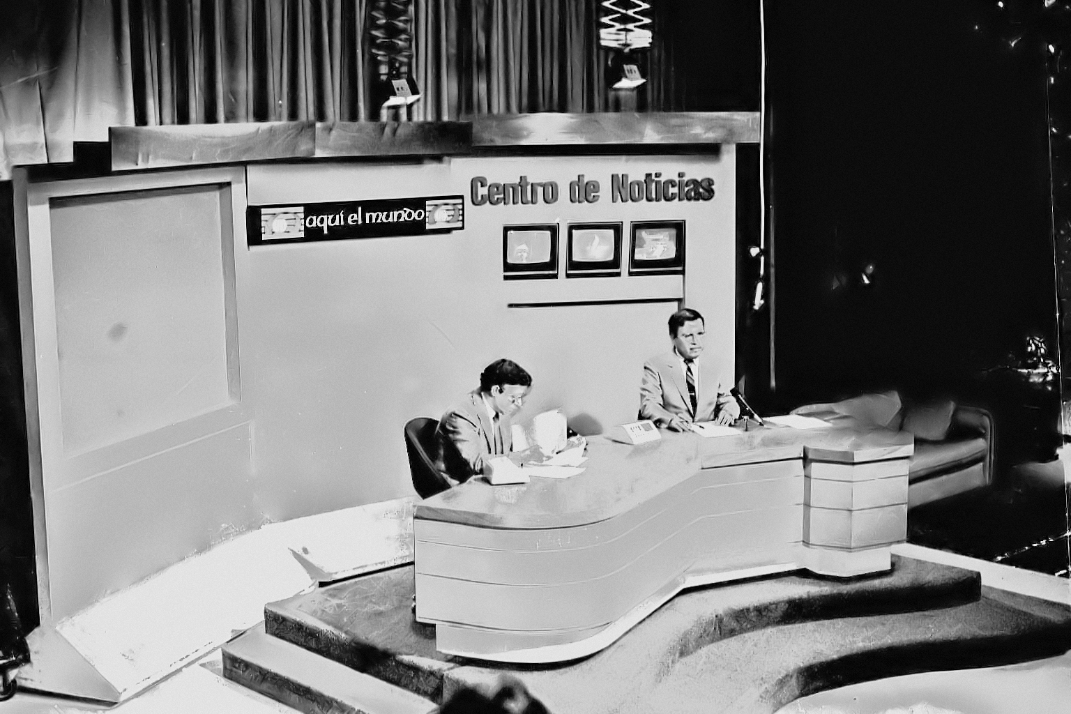 Última transmisión del noticiero Aquí El Mundo el 6 de Junio de 1988, en los estudios de Teletenango Canal 3 en la zona 11 de la capital de Guatemala.